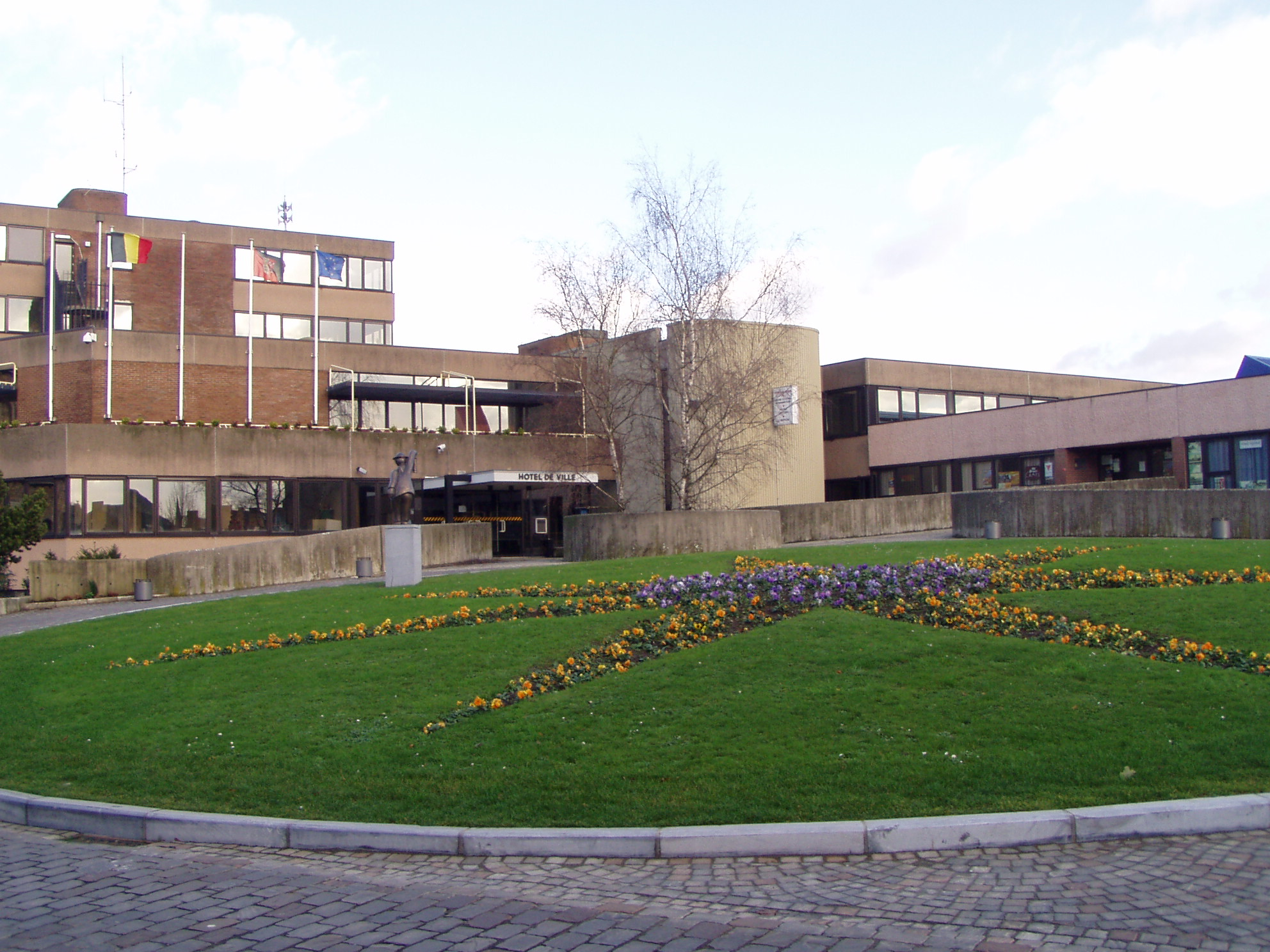 L'Hotel de Ville d'Auvelais, entre la Place Communale et la rue Pont-Sainte Maxence